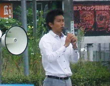 広島県福山市赤坂町の赤坂バイパス東口交差点付近で街頭演説をする小林史明の様子。2012年8月27日に撮影。なお小林は2012年12月に衆議院議員に当選している。